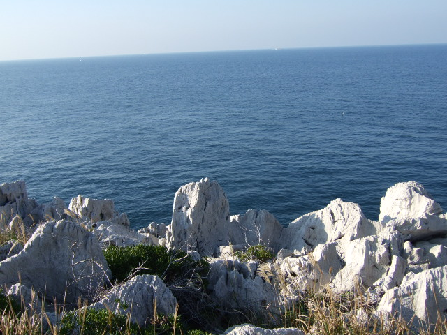 白崎海洋公園